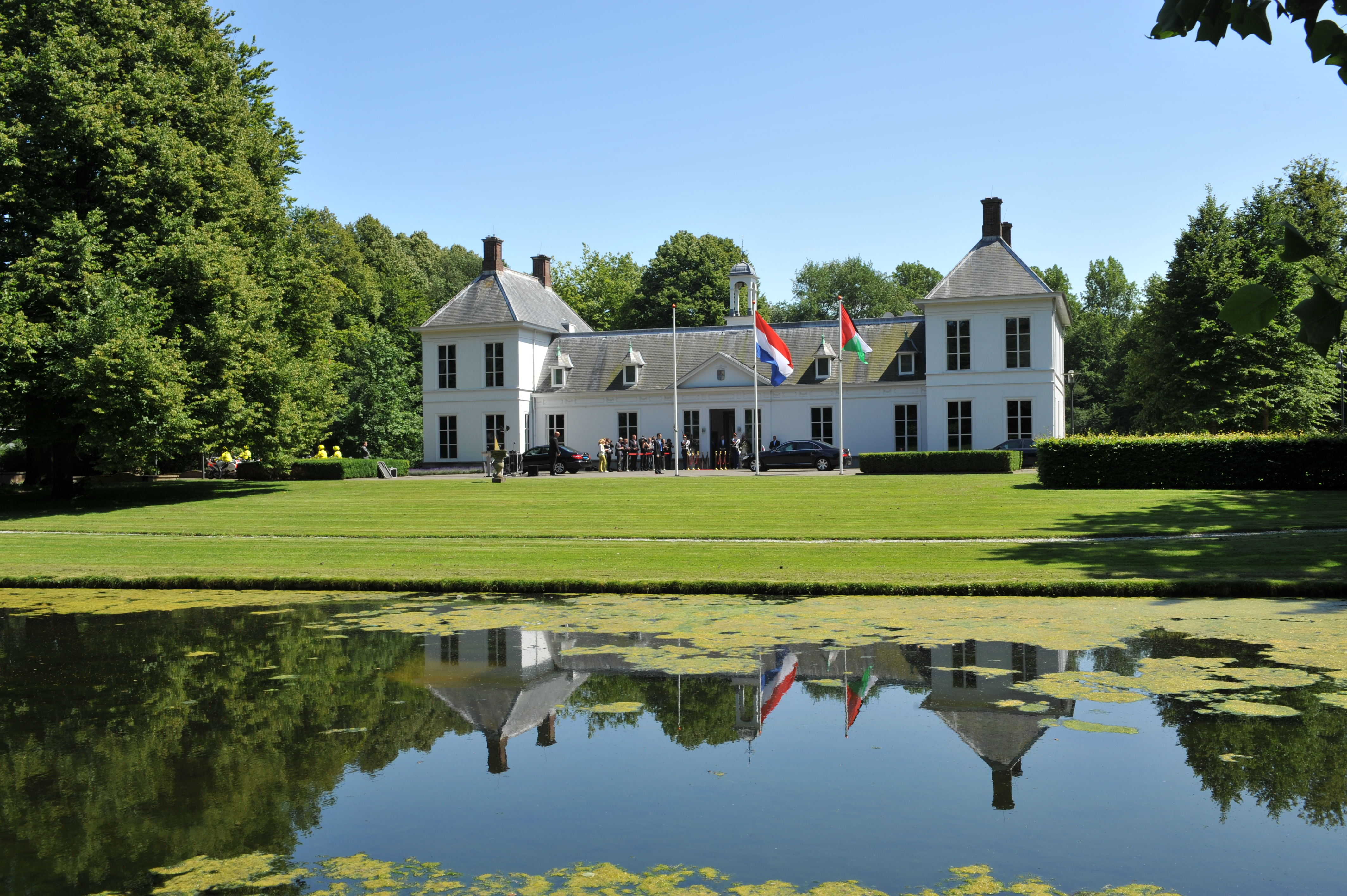 Op uitnodiging van de Nederlandse regering brengt president Abbas van de Palestijnse Autoriteit woensdag 29 juni tot en met vrijdag 1 juli een werkbezoek aan Nederland. Hare Majesteit de Koningin ontvangt president Abbas op donderdag 30 juni in audiëntie op paleis Huis ten Bosch. Daarnaast heeft president Abbas een ontmoeting met minister-president Rutte. Minister Rosenthal van Buitenlandse Zaken ontvangt president Abbas voor een lunch. Het programma van president Abbas bestaat verder uit onder andere een ontmoeting met de voorzitters van de Eerste en Tweede Kamer.